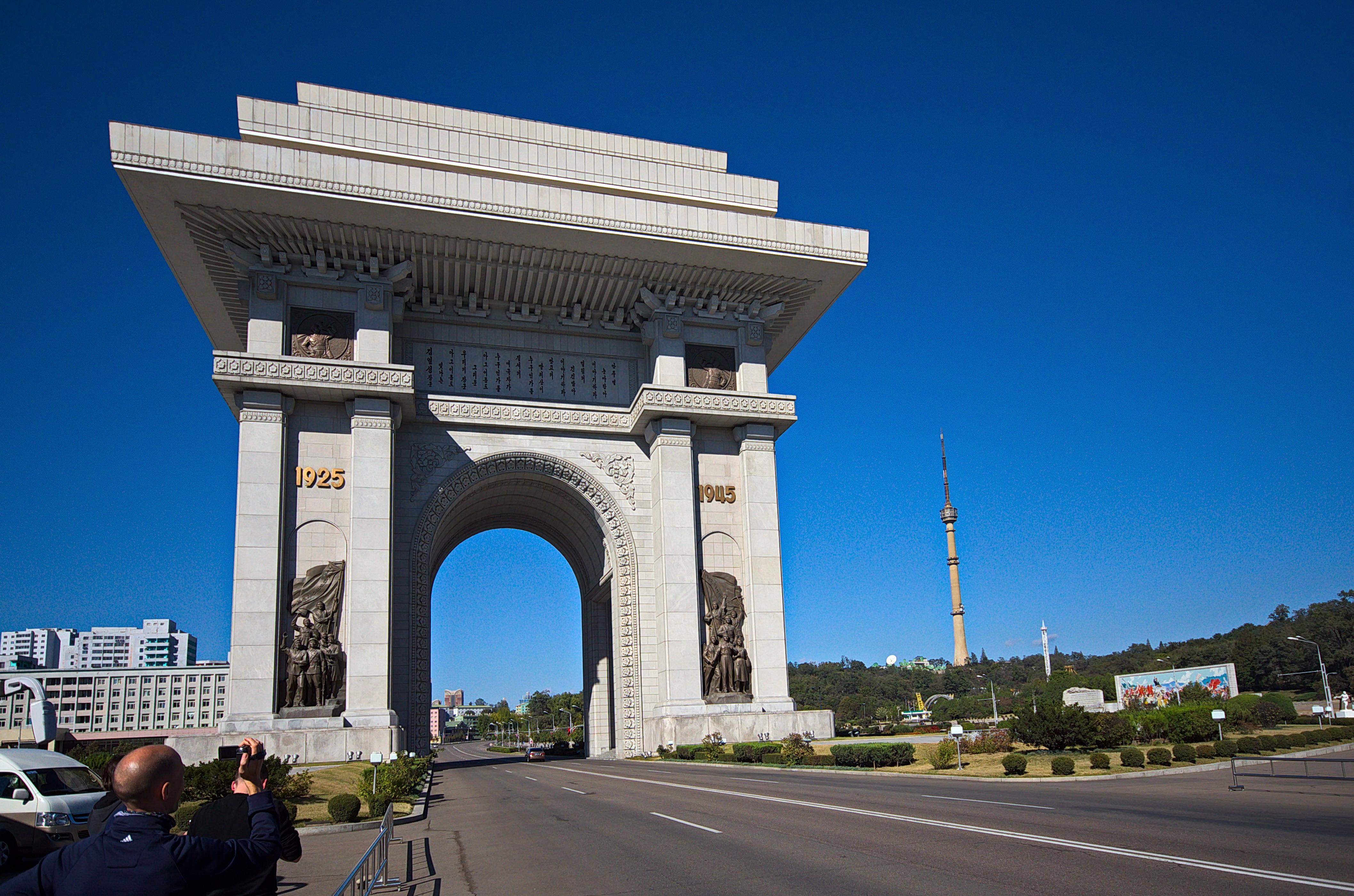 Nordkorea